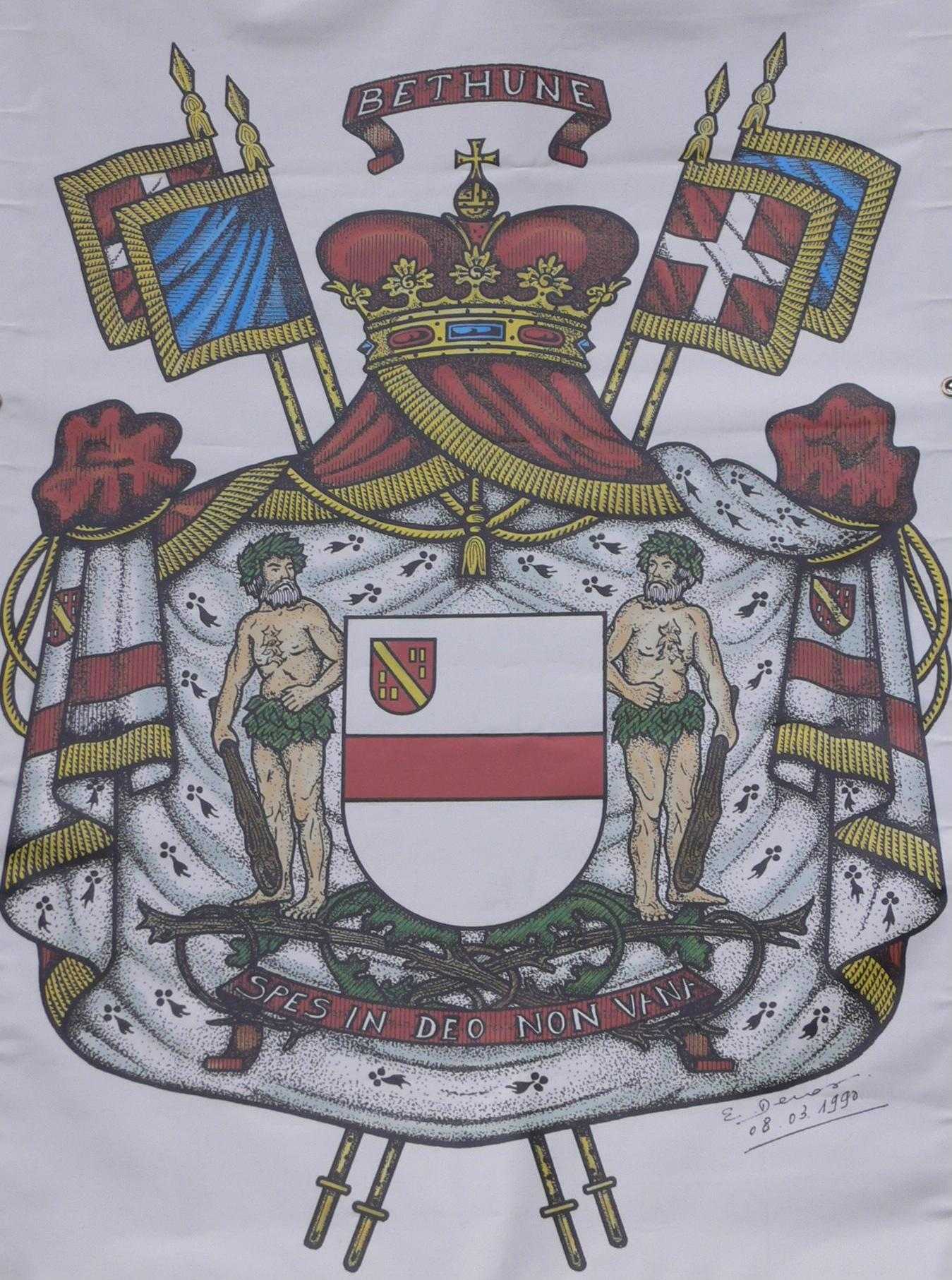 Armes actuelles de la Maison de Béthune (branche Hesdigneul)